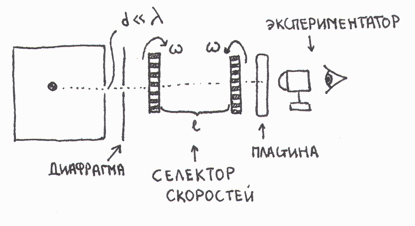 селектор скоростей